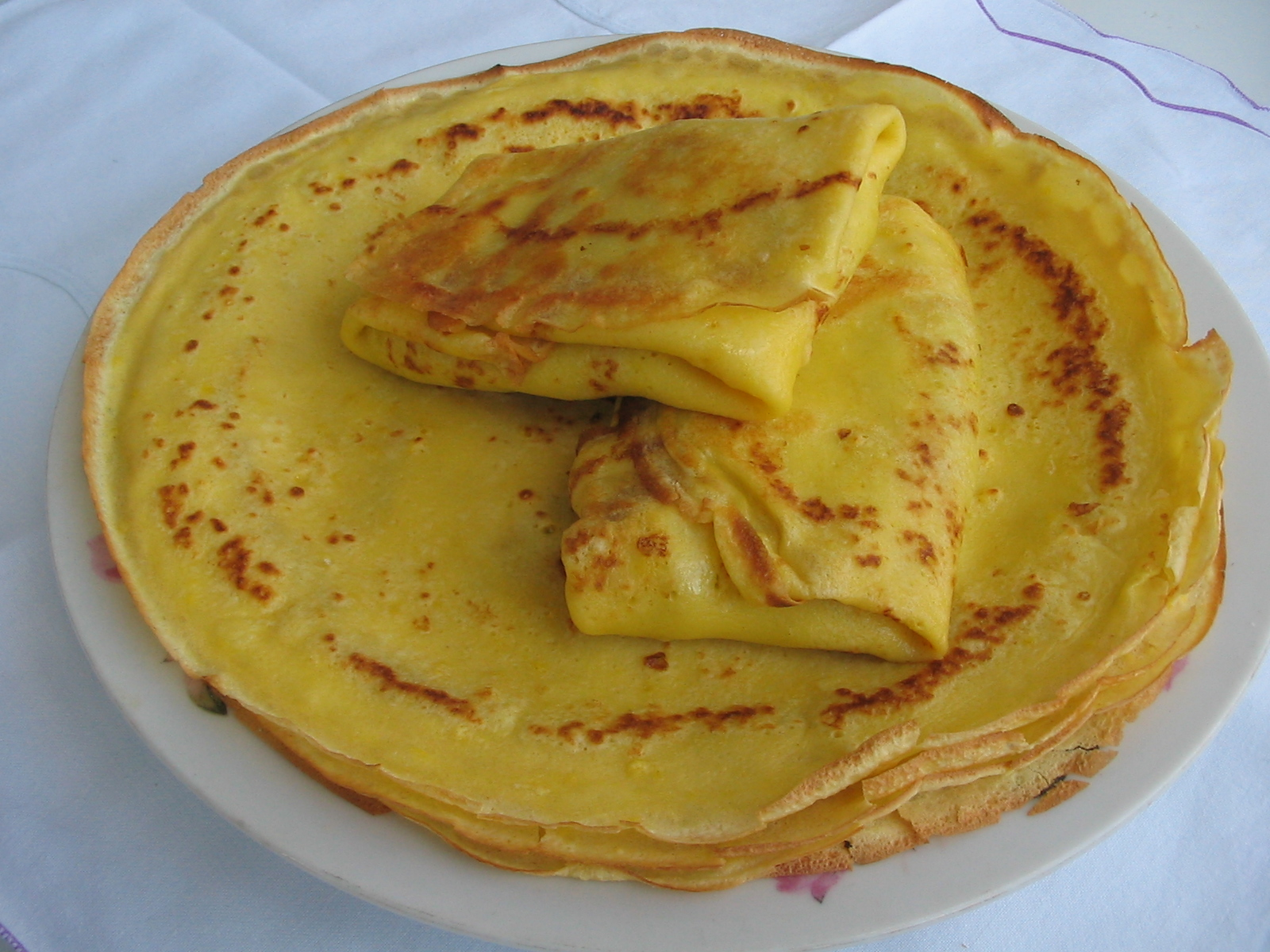 страва української кухні виготовлена з прісного тіста